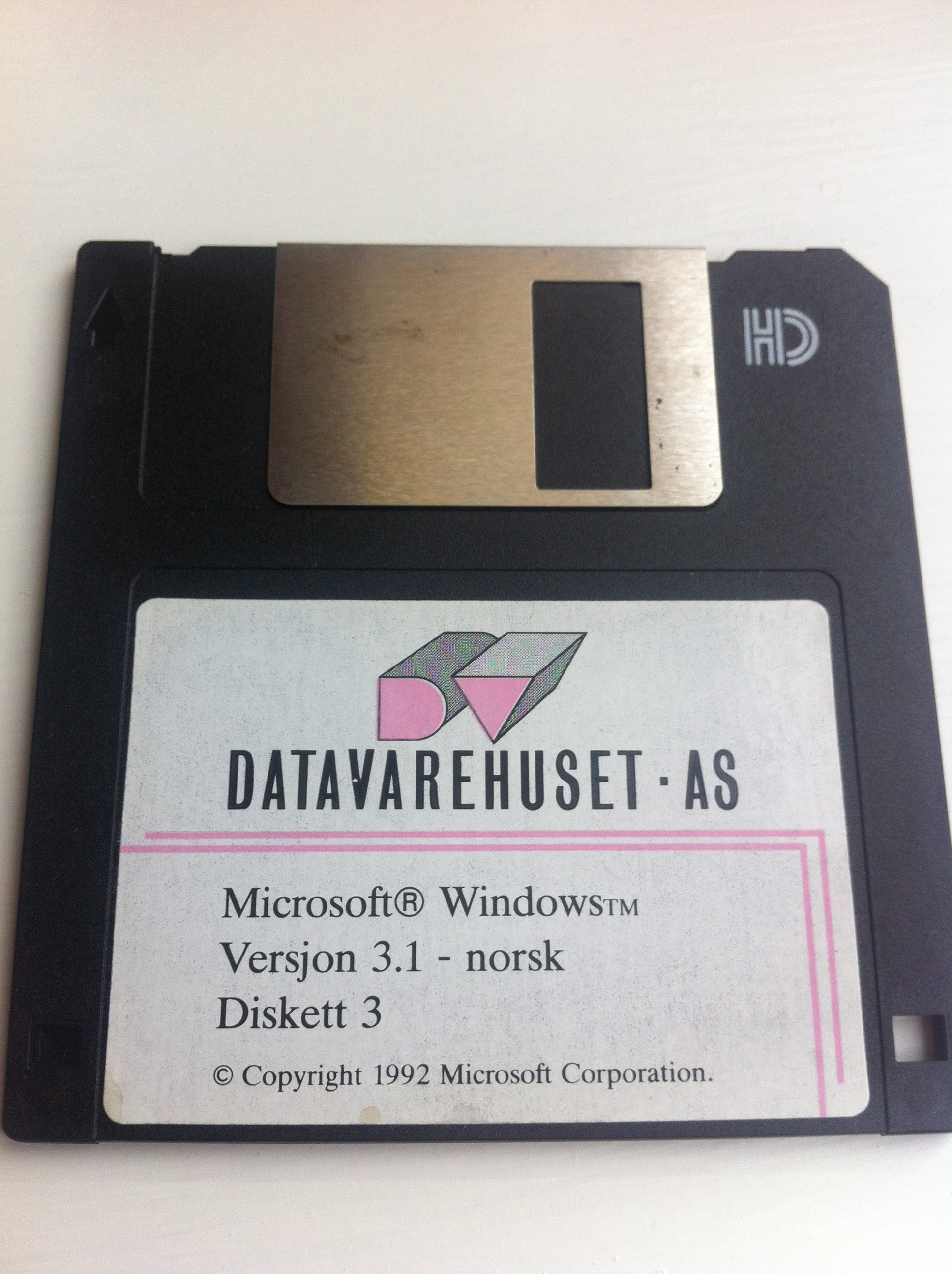 Installeringsdiskett for Windows 3.1 levert av Datavarehuset.